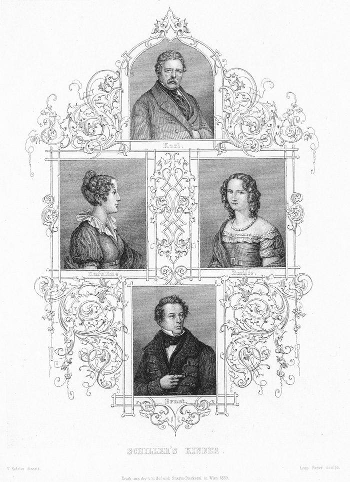 Friedrich Schillers Kinder, laut Bildaufschrift Karl (Freiherr Karl Friedrich Ludwig von Schiller), "Karoline" (tatsächlich Caroline Henriette Luise von Schiller), Emilie (Emilie Friederike Henriette von Schiller) und Ernst (Ernst Friedrich Wilhelm von Schiller) Beschreibung laut Quelle: "Schiller's Kinder. Carl. Caroline. Emilie. Ernst. V. Katzler direxit. Leop[old] Beyer sculps[it]. Druck aus der k. k. Hof- und Staats-Druckerei in Wien 1859. - Stahlstich in Schmuckrahmen, 25,3 x 17,8 cm." (Goethezeitportal, mit Verweis auf "Meyers Großes Konversations-Lexikon, 6. Aufl. 1905-1909; Bd. 17, S. 801; Digitale Bibliothek 100, S. 175406 f.; Auszug.")